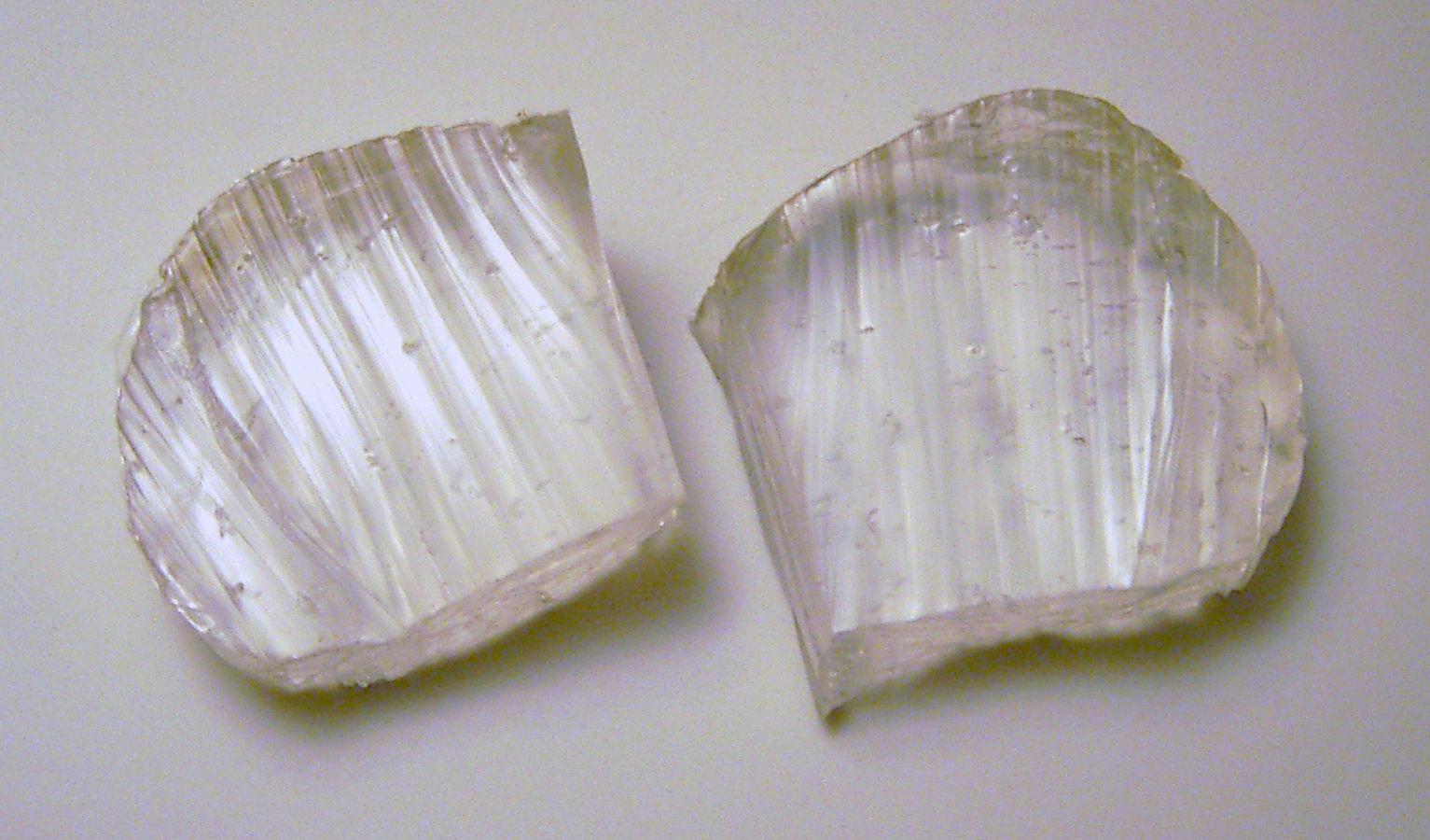 Oppanol B100 (BASF) - Polyisobuten/Polyisobutylen Molmasse ~1.000.000